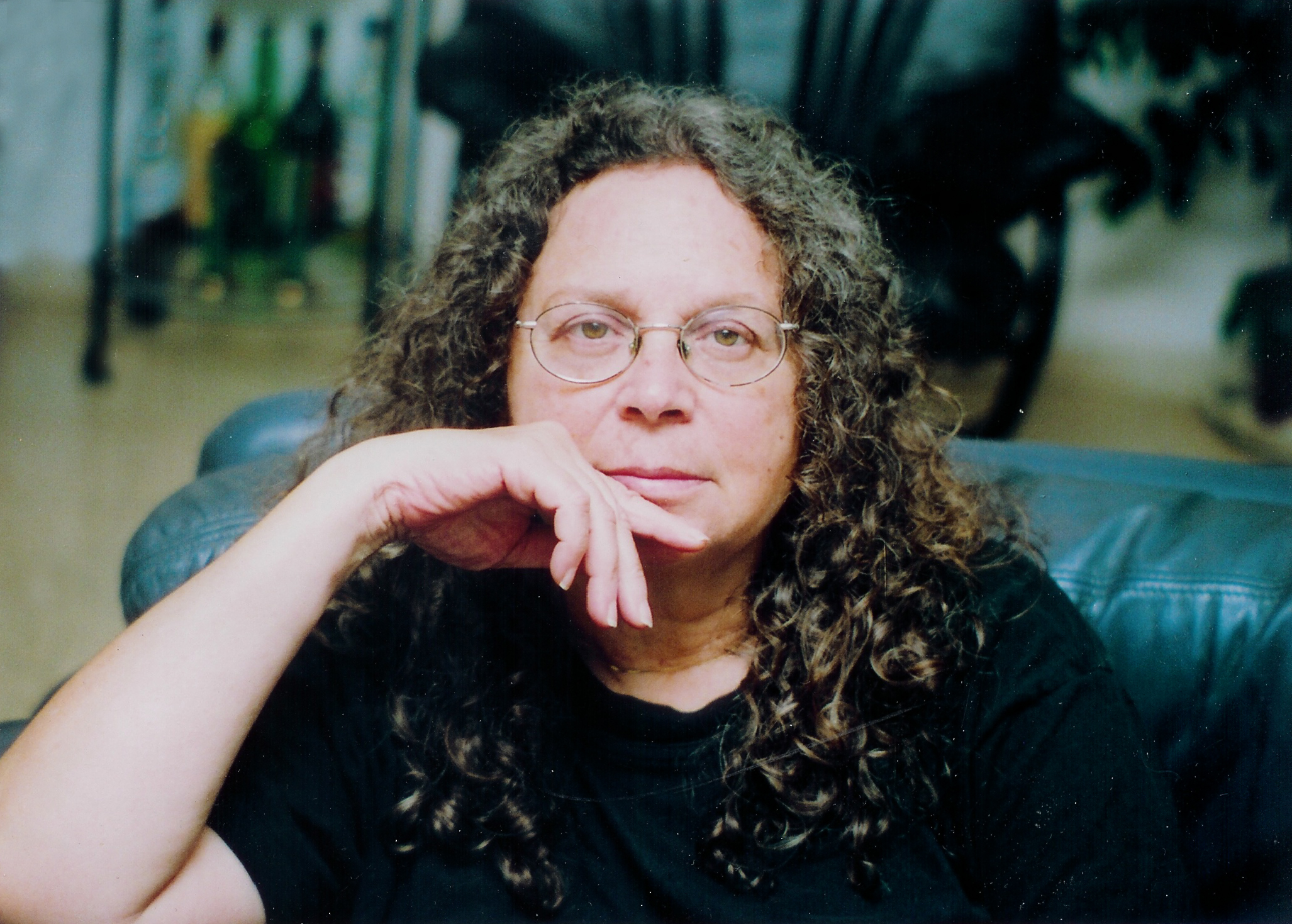 Israeli Activist Erella Shadmi